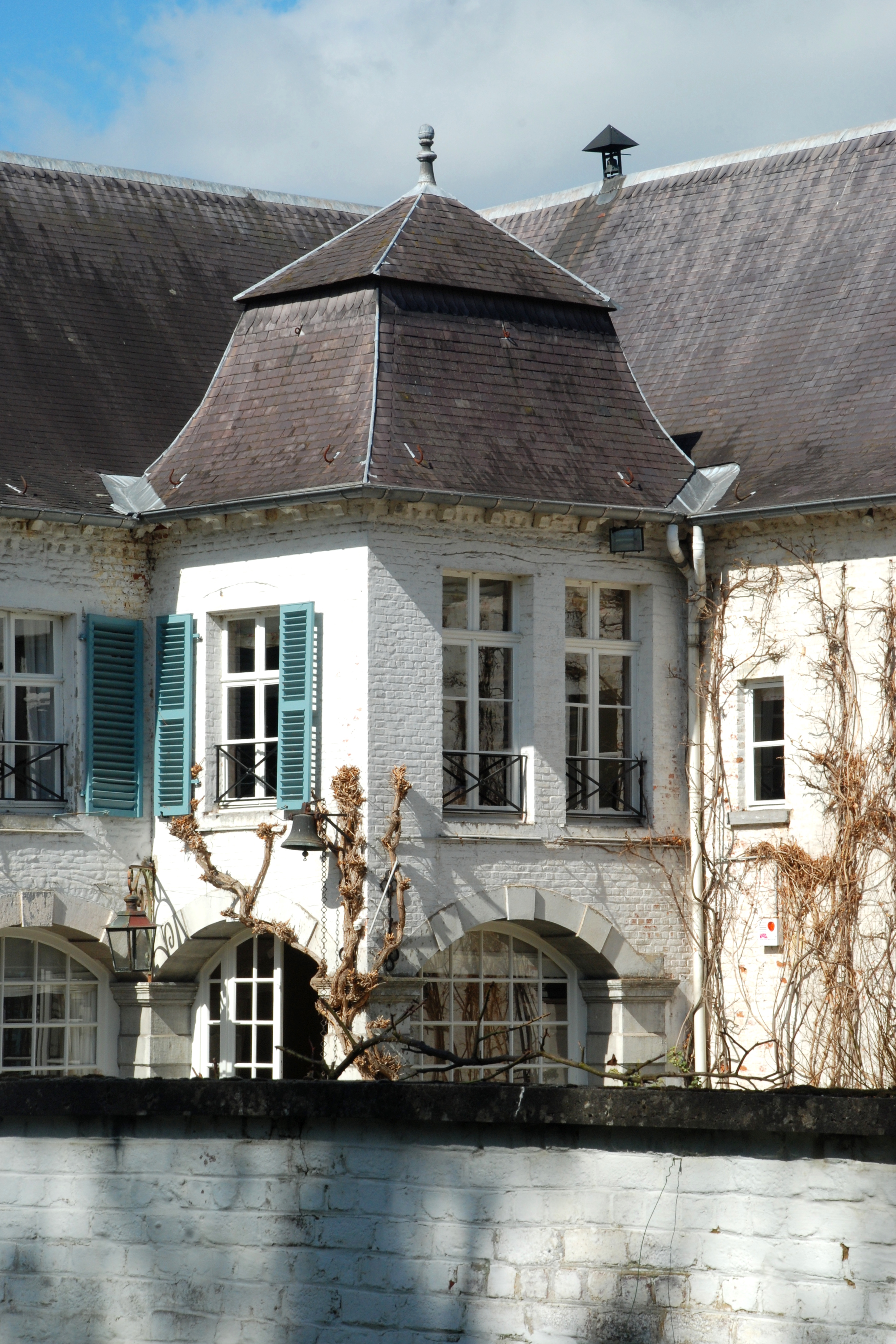 Belgique - Brabant wallon - Genappe - Château de Bousval